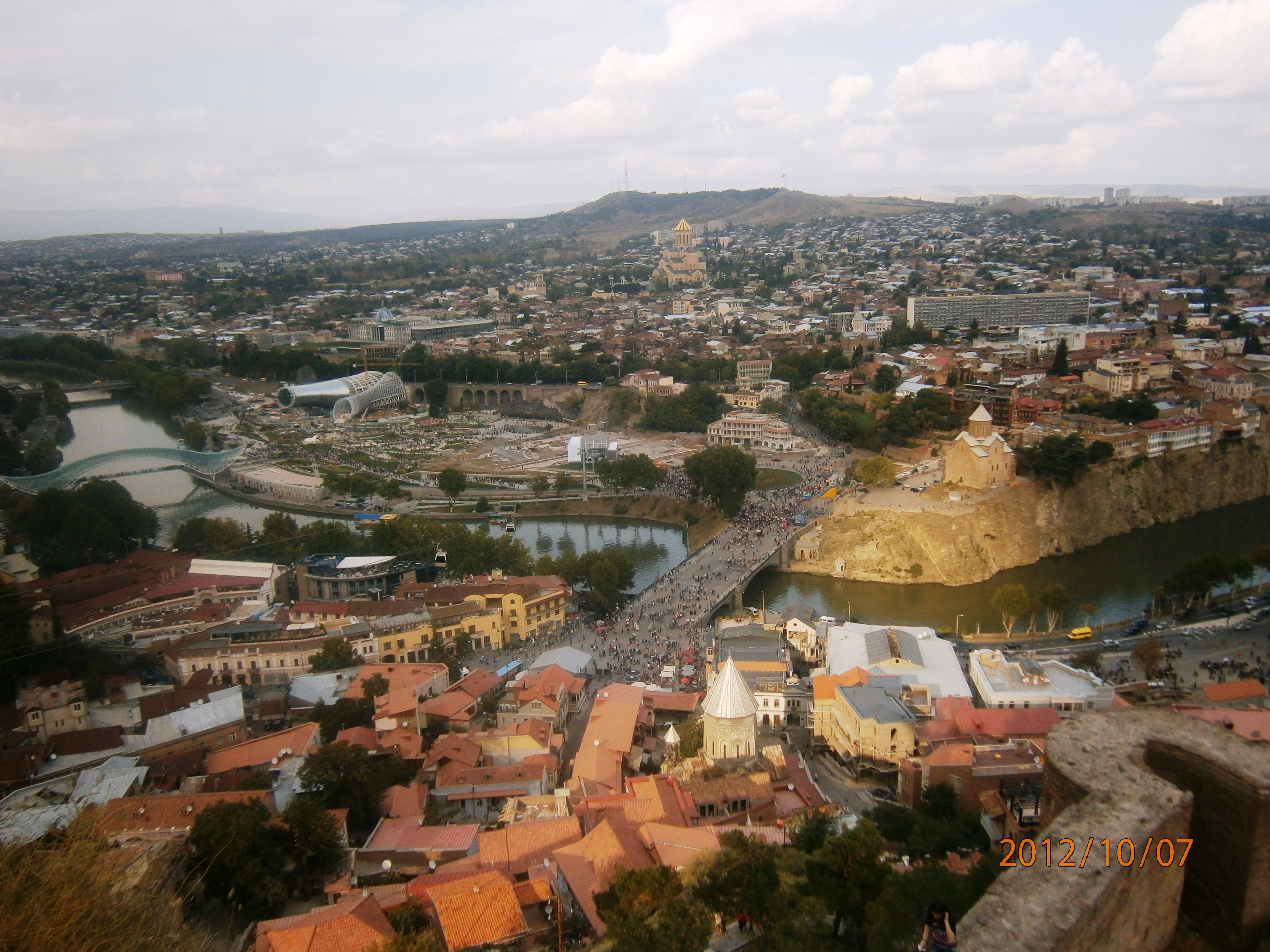 Dzveli Tbilisi, Tbilisi, Georgia